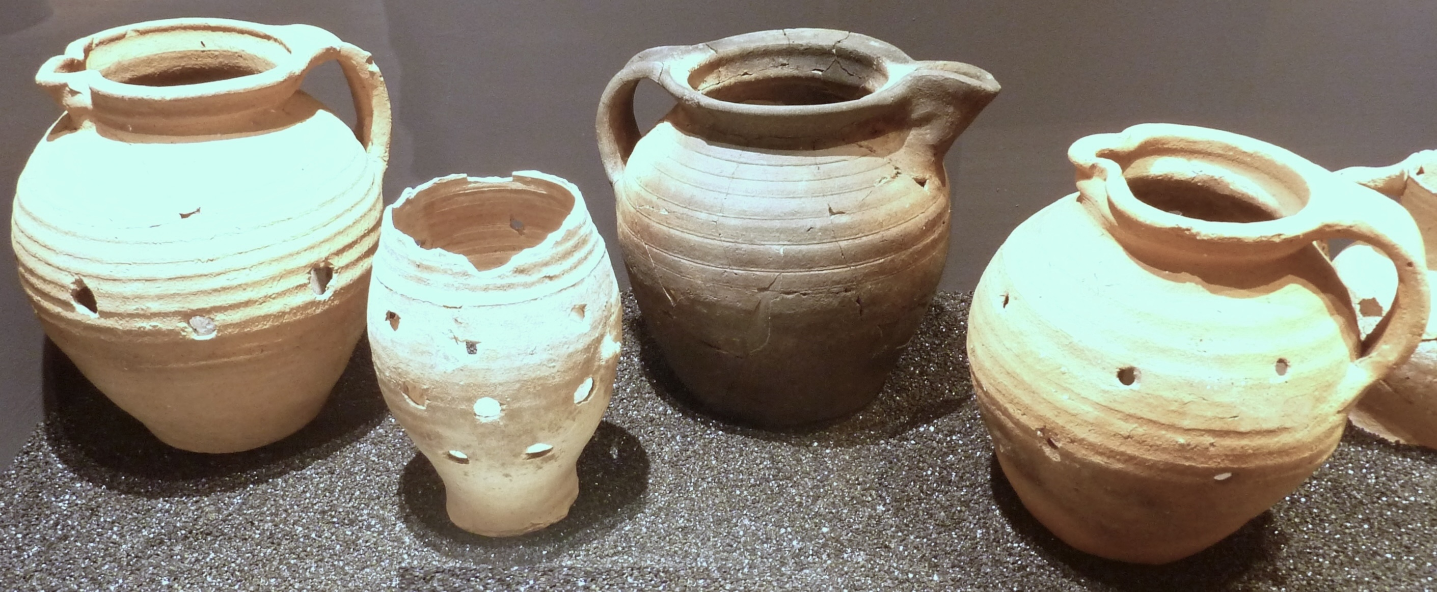 Vases (pichets) en terre cuite (dont trois présentent des perforations volontaires) trouvés par Gustave de Closmadeuc dans l'île de Gavrinis dans la seconde moitié du XIXe siècle et datant du XIIIe ou du XIVe siècle (récipients servant à l'eau ou au vin transformés probablement en vases à encens) [Musée d'histoire et d'archéologie de Vannes]